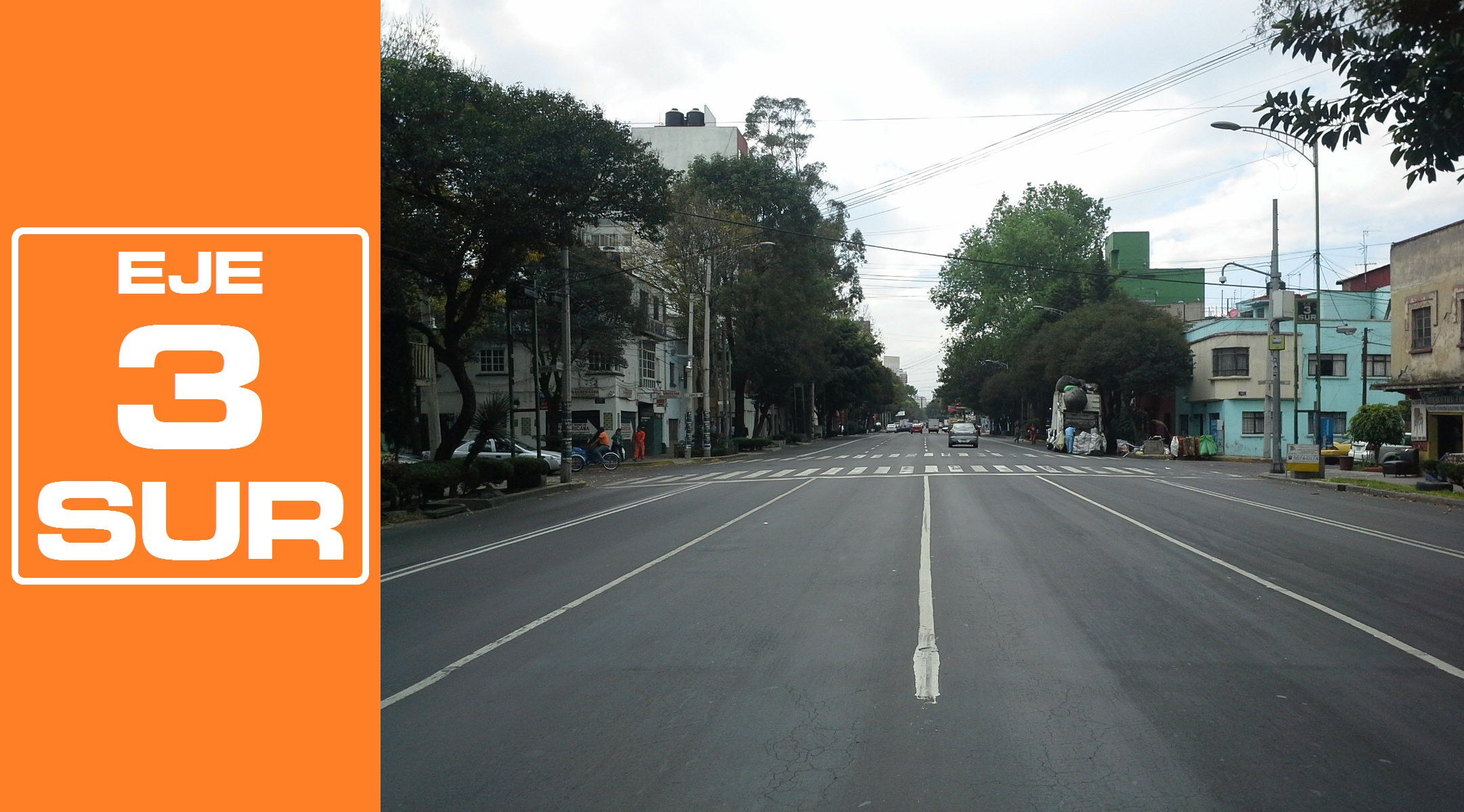 Rediseñado original de la señalética de los Ejes viales de la Ciudad de México por José García (Wiki ID: narumiyama)